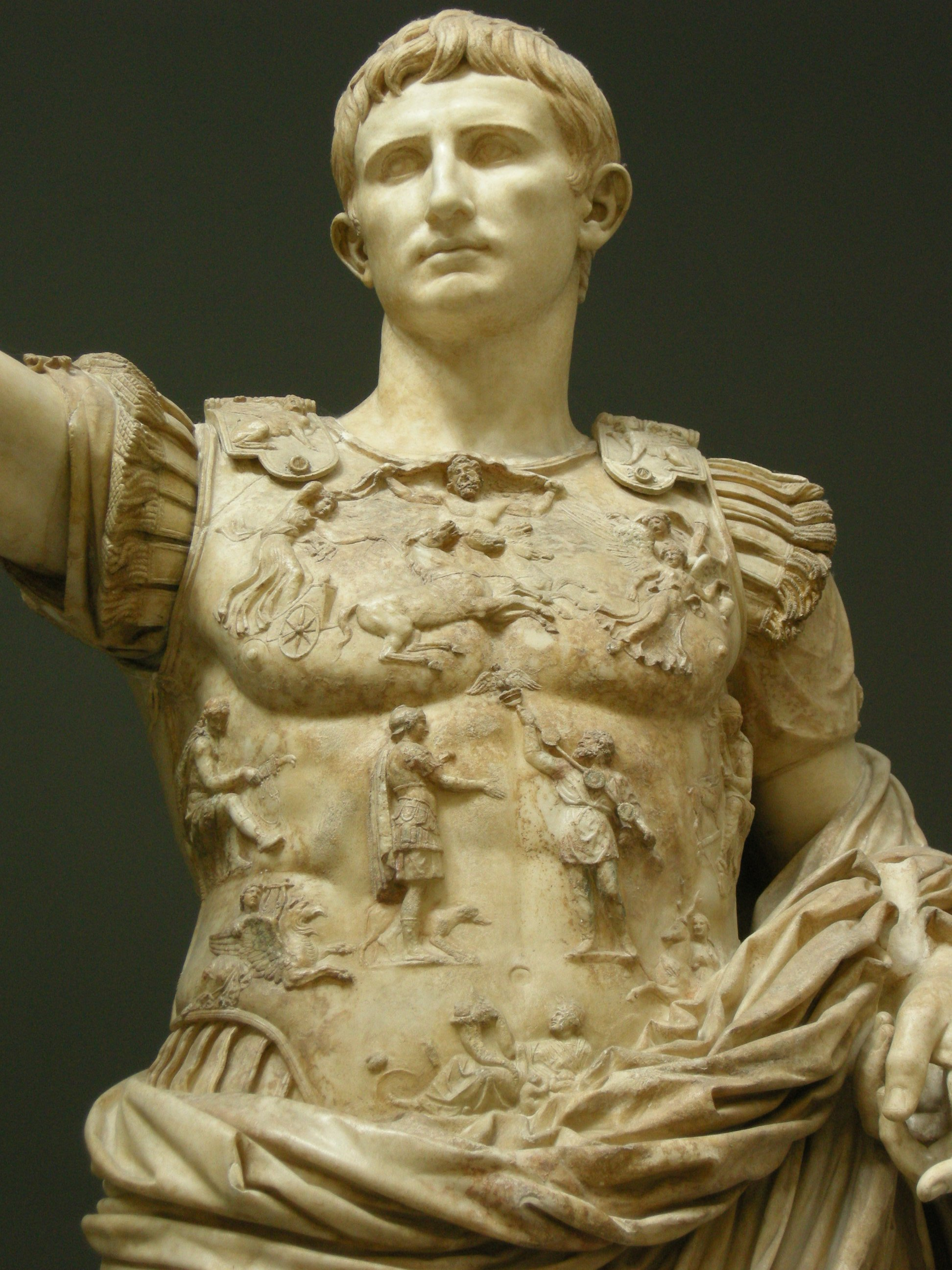 Augusto di pirma porta, inv. 2290